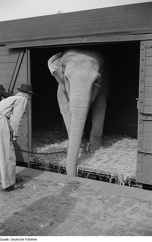 Original image description from the Deutsche Fotothek Ausstieg der Elefantenkuh aus dem Wagon